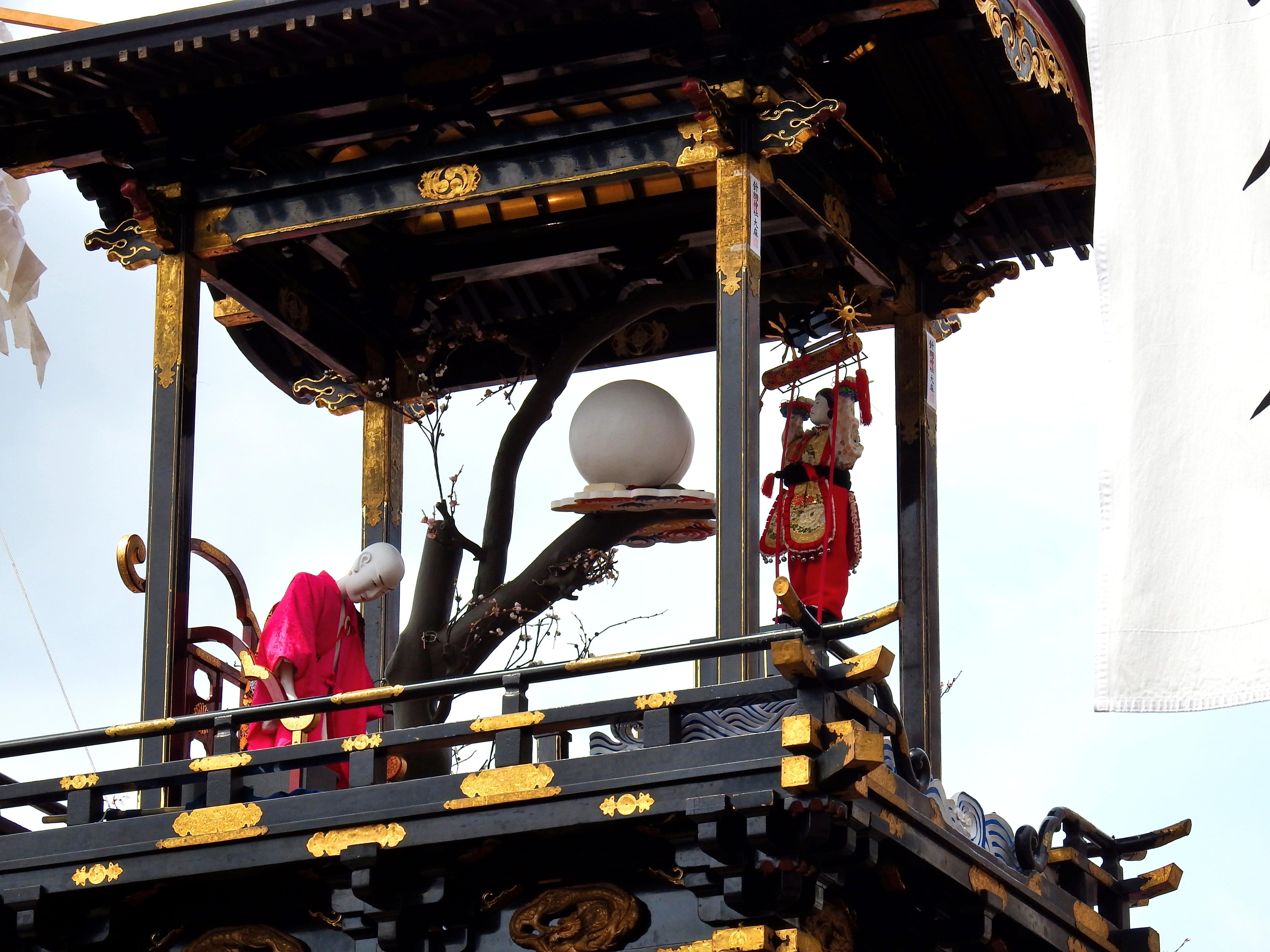 犬山祭の奉納山車からくり